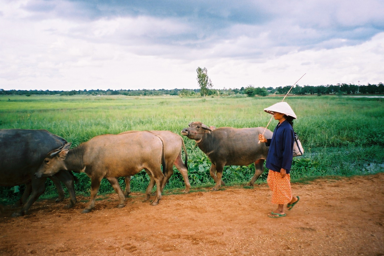 Local commons in Chaiyaphum, Thailand, offer a free common grass to villagers. This picture of water buffalos - Bos bubalus - was taken by TORIKAI Yukihiro, a Japanese economist, in 2003/09/03. ローカル・コモンズとしての牧草の利用：農地の脇や，道路の脇の草を食ませながら牛追いをする。現地住民は、地域コミュニティの他のメンバーにも配慮して、牧草を利用しているので、ローカル・コモンズについては，コモンズの悲劇は，当てはまらないと考えられる。2003年9月タイ東北部チャイヤプーン県で鳥飼行博撮影。